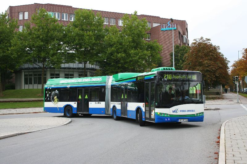 18 Hybrid Allison